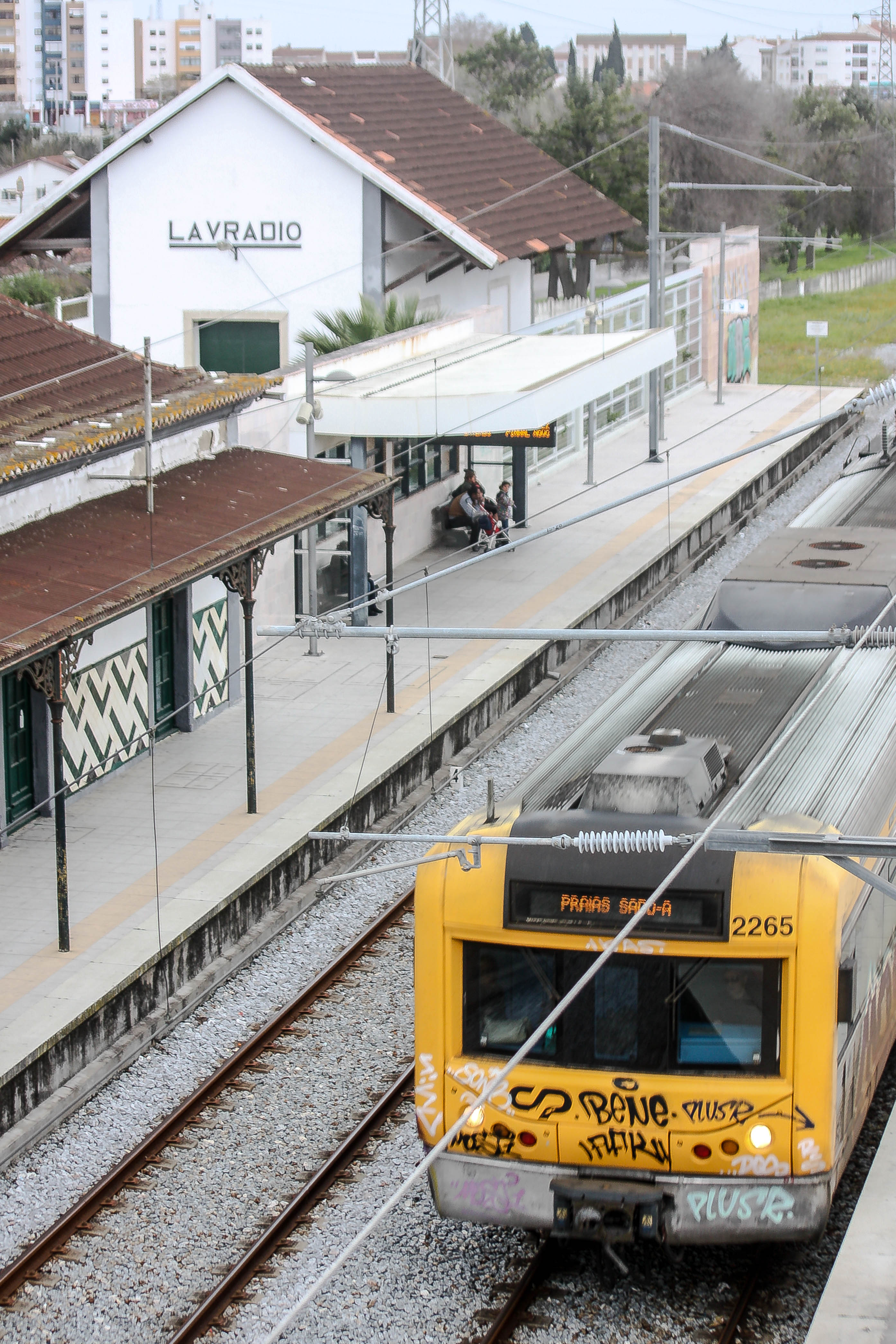 CP 2265 a dar entrada na linha 2 da Estação Ferroviária do Lavradio, com destino ao Barreiro.